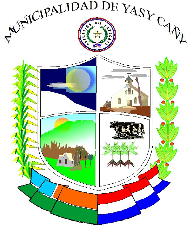 insignia de Yasy Cañy